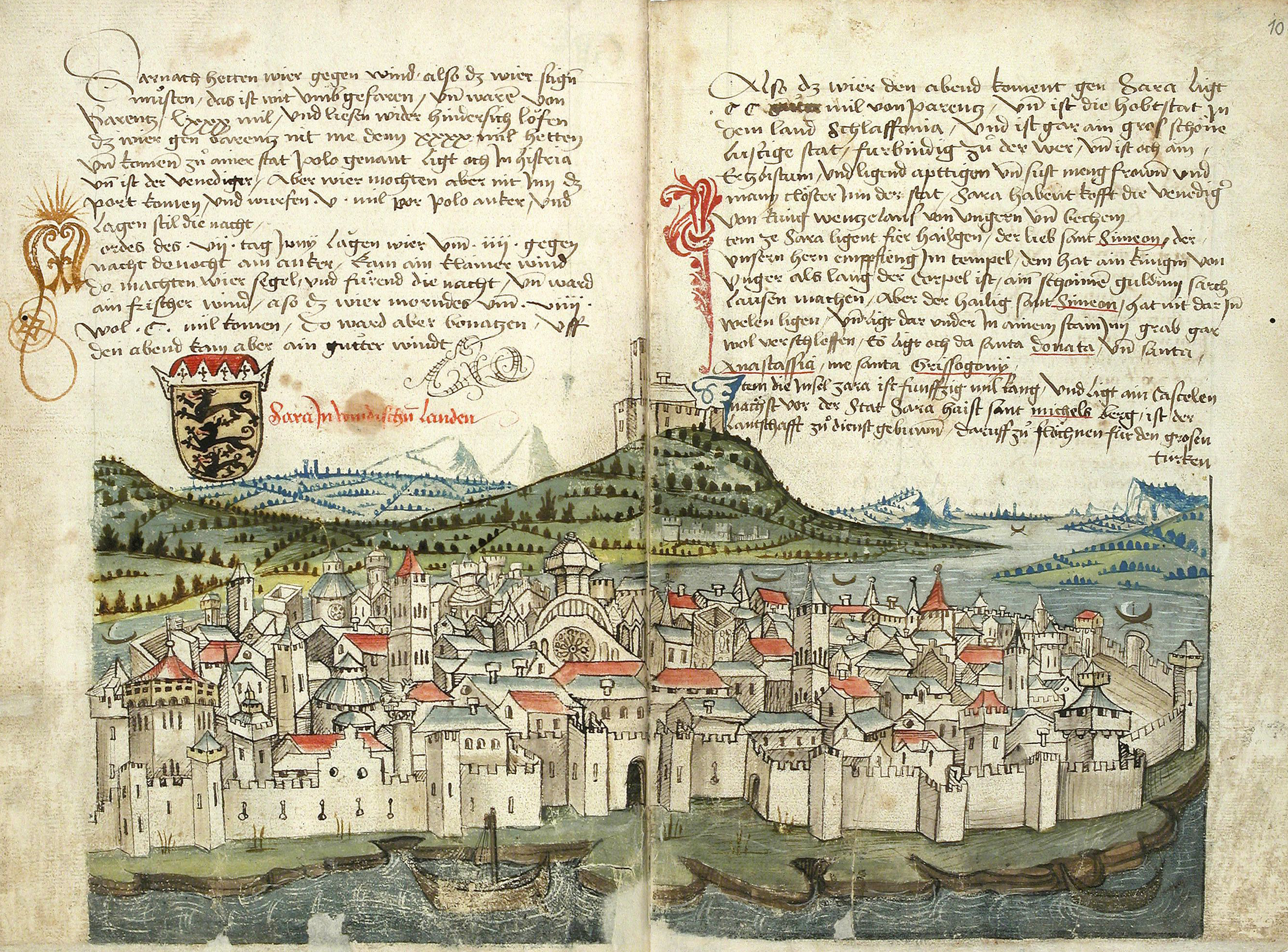 Zadar. Doppelseite, aus Conrad Grünenberg: Beschreibung der Reise von Konstanz nach Jerusalem. Bodenseegebiet, um 1487. Badische Landesbibliothek Karlsruhe, Cod. St. Peter, pap. 32.